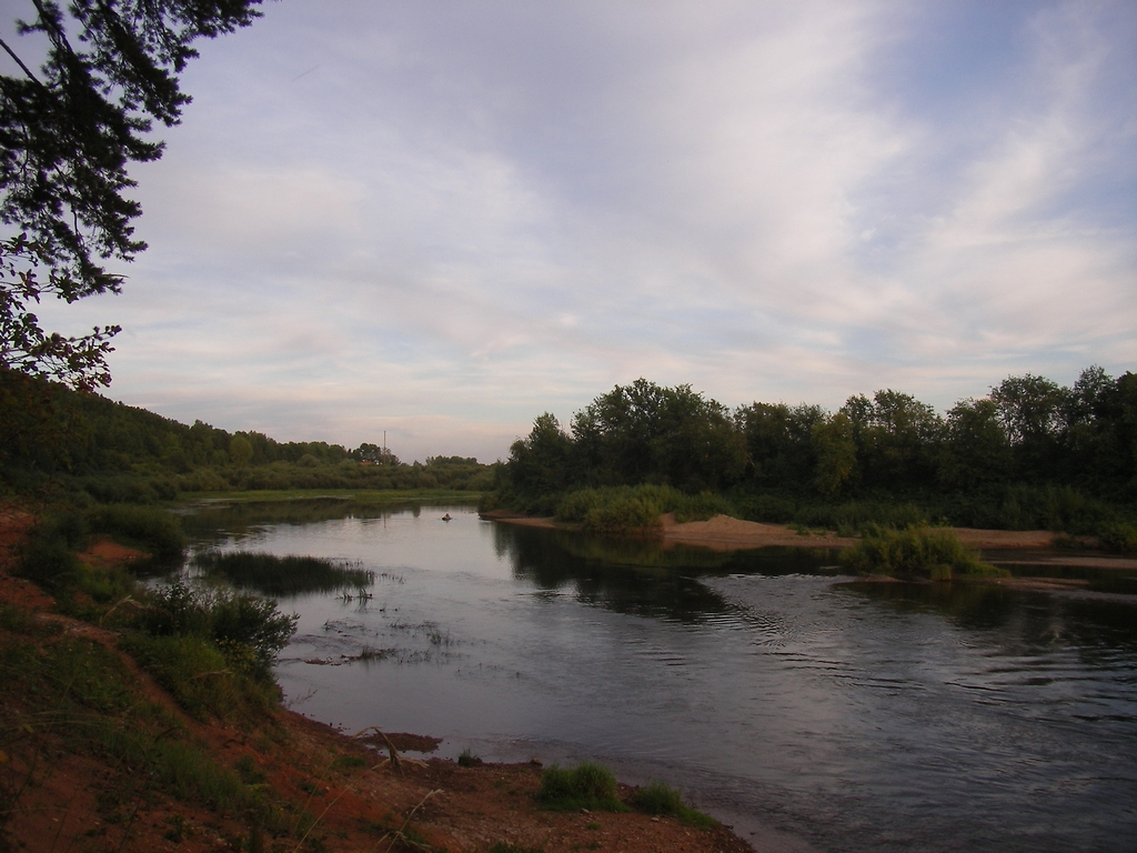 Река Чепца